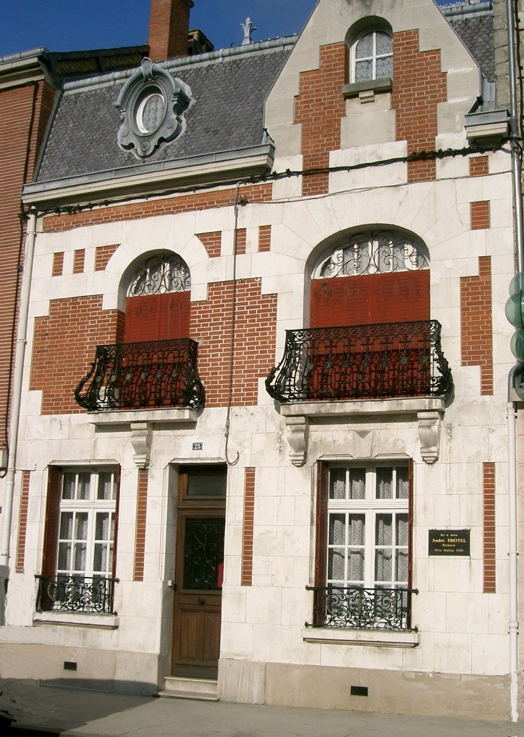 Maison d'André Dhôtel, à Attigny - Ardennes self made PRA